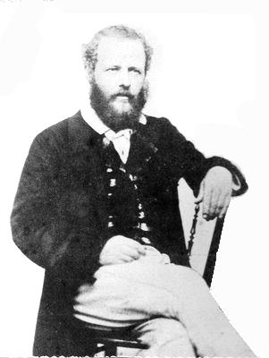 Peacocke- pre 1847